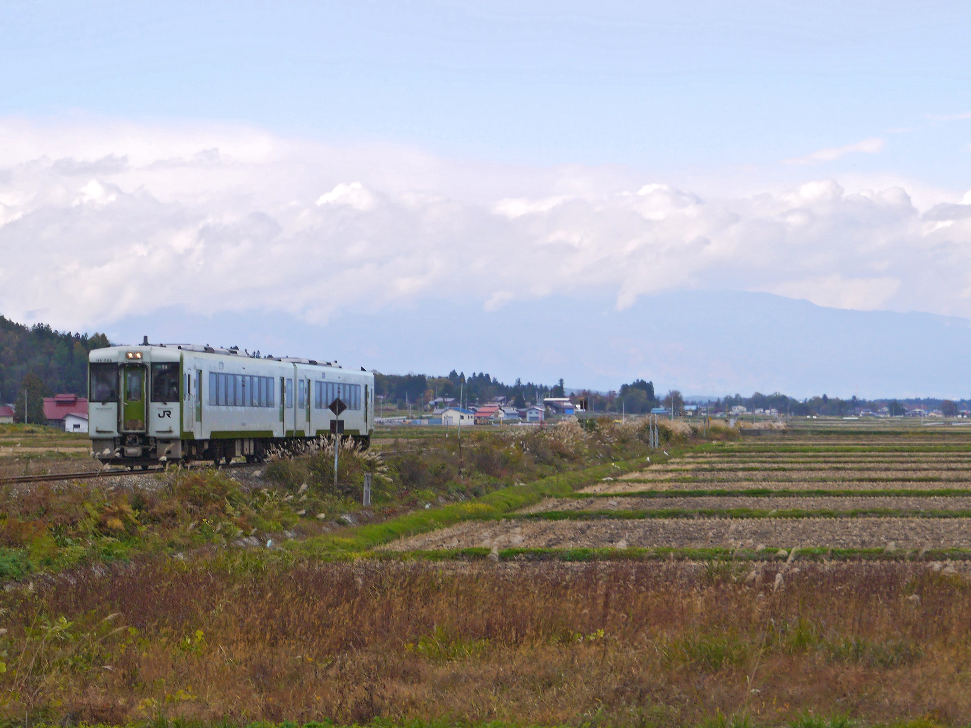 JR米坂線 成島～中郡間